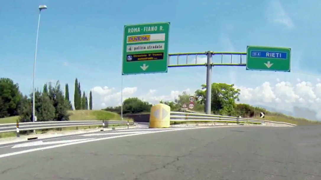 Immagine del casello di Fiano Romano, sull'autostrada A1 diramazione Roma nord, subito dopo la barriera del pedaggio, all'imbocco della SS4 Dir "diramazione Salaria" per Rieti